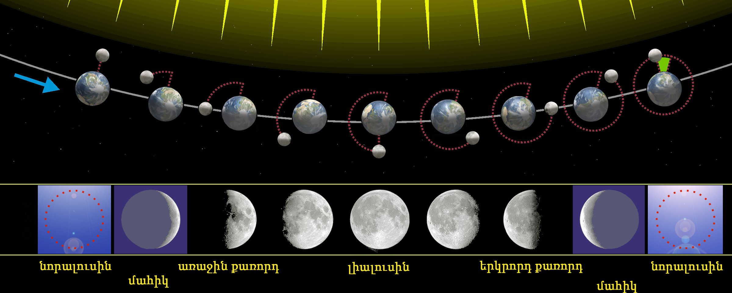 Լուսնի փուլերի կապը Երկրի շուրջը պտտվելու հետ։